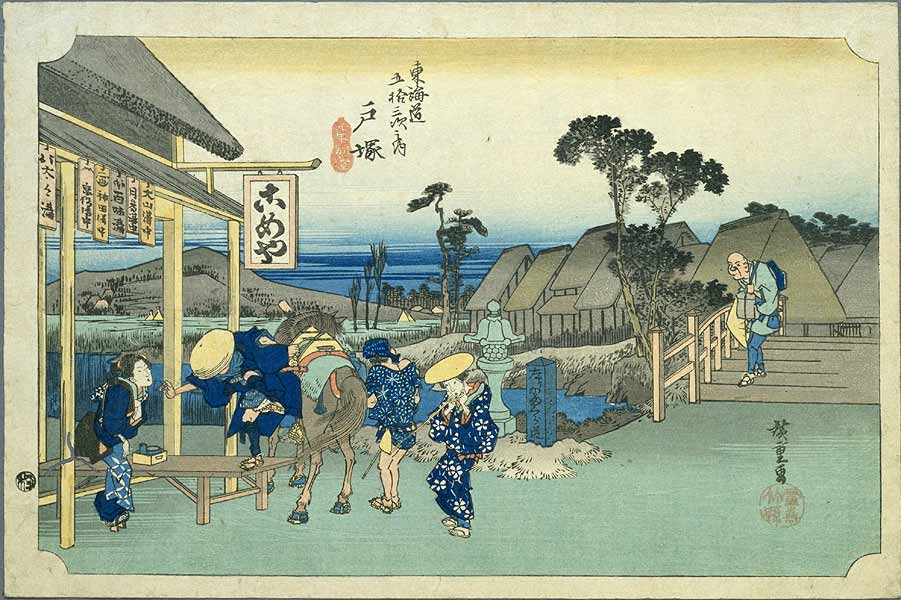 Totsuka on the Tokaido, ukiyo-e prints by